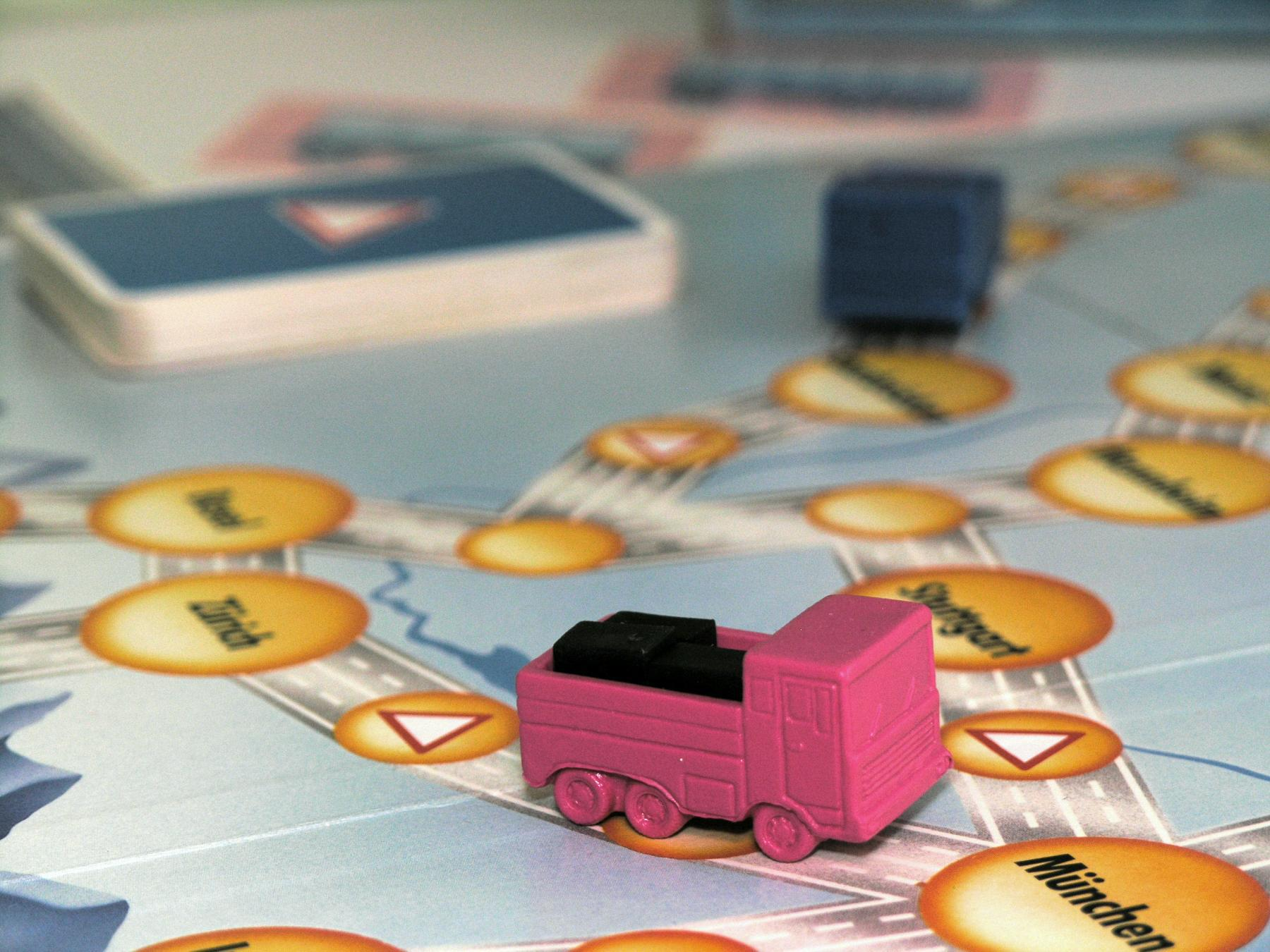 Auf Achse